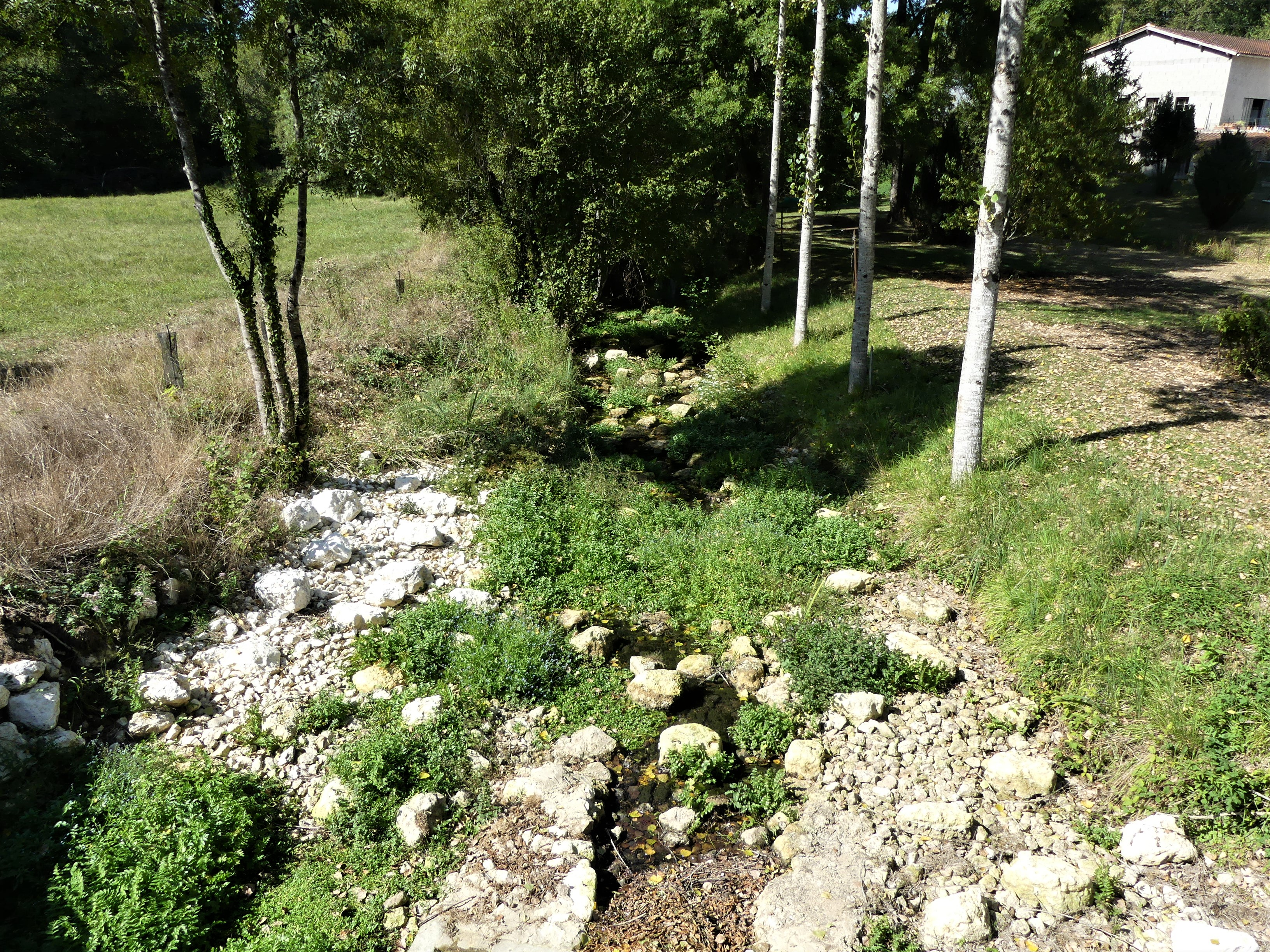 Au pont de la route départementale 708, la Nizonne marque la limite entre Mareuil en Périgord (ancienne commune de Saint-Sulpice-de-Mareuil) (à gauche) et Rudeau-Ladosse (à droite), Dordogne, France. Vue prise en direction de l'aval.